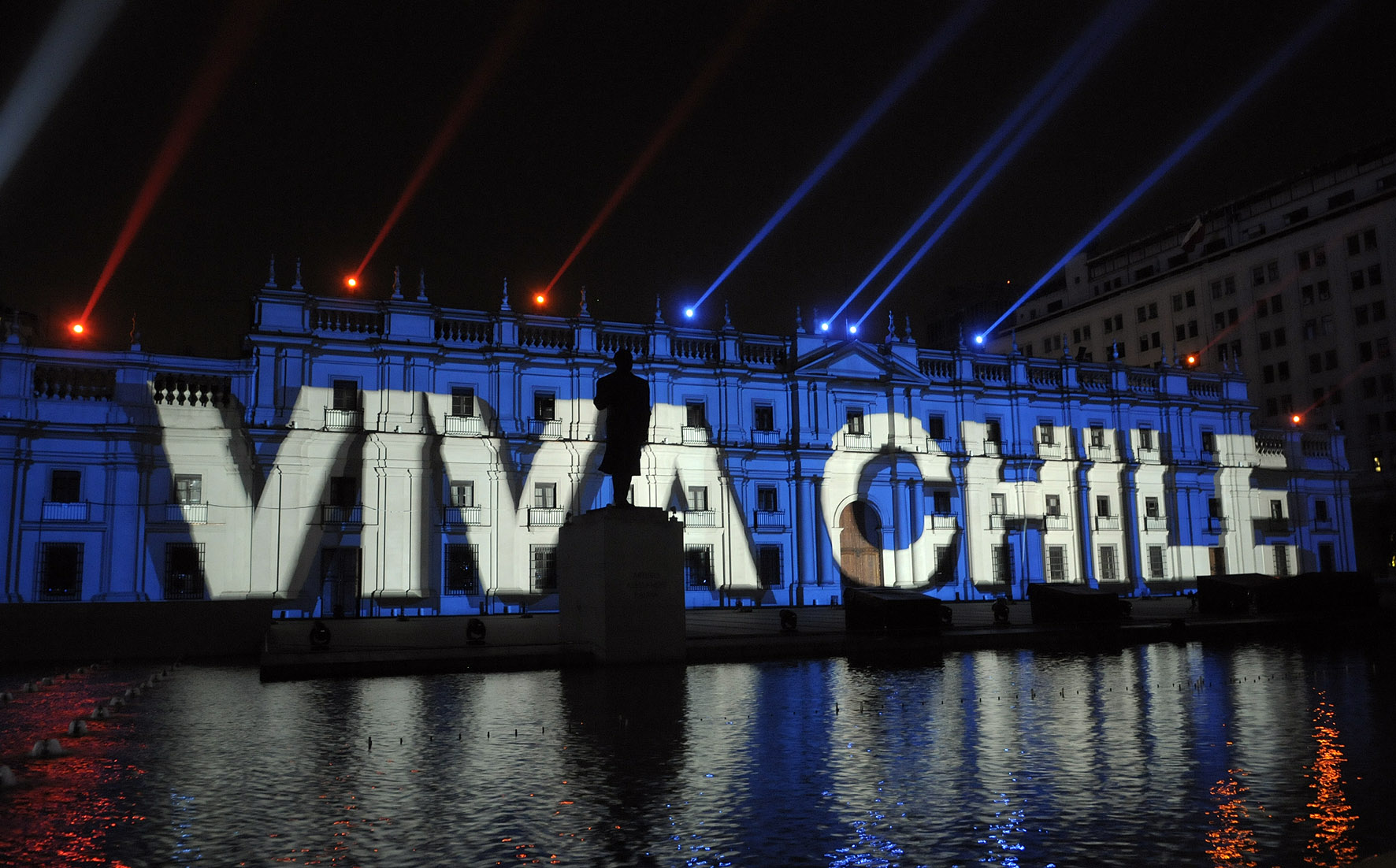 “Pura energía, puro Chile” fue el evento de luces que dio vida al frontis del Palacio de La Moneda entre los días 16 y 21 de septiembre. El espectáculo dirigido por Martin Arnaud, de la compañía Le Petit Francais, fue traído a Chile por la CGE. El lanzamiento de este show, efectuado el jueves 16, contó con la presencia del Presidente de la República, Sebastián Piñera, su esposa, Cecilia Morel, y las más altas autoridades del país. El juego de luces que se proyecta en La Moneda es un recorrido histórico por los hitos más importantes de nuestra cultura e identidad y tiene una duración de 30 minutos. ”Que el telón donde se proyecta la historia de Chile, sea La Moneda, que ha estado con nosotros estos 200 años de vida independiente, porque se inauguró a comienzos del siglo XIX, en 1803, antes de la Independencia, es un momento histórico, un momento de mucha emoción”, destacó el Mandatario el primer día de esta actividad Bicentenario.